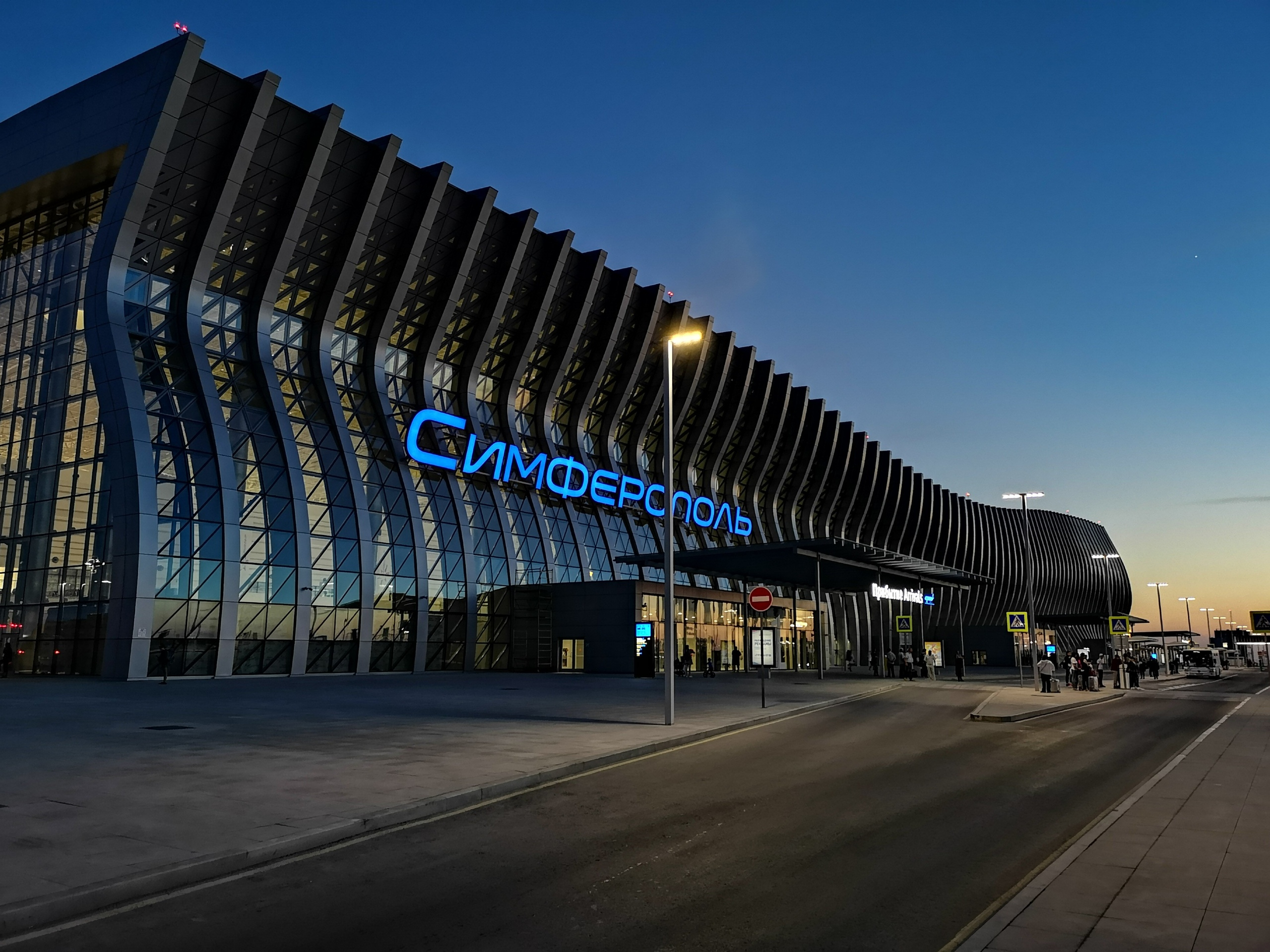 Терминал "Крымская волна"